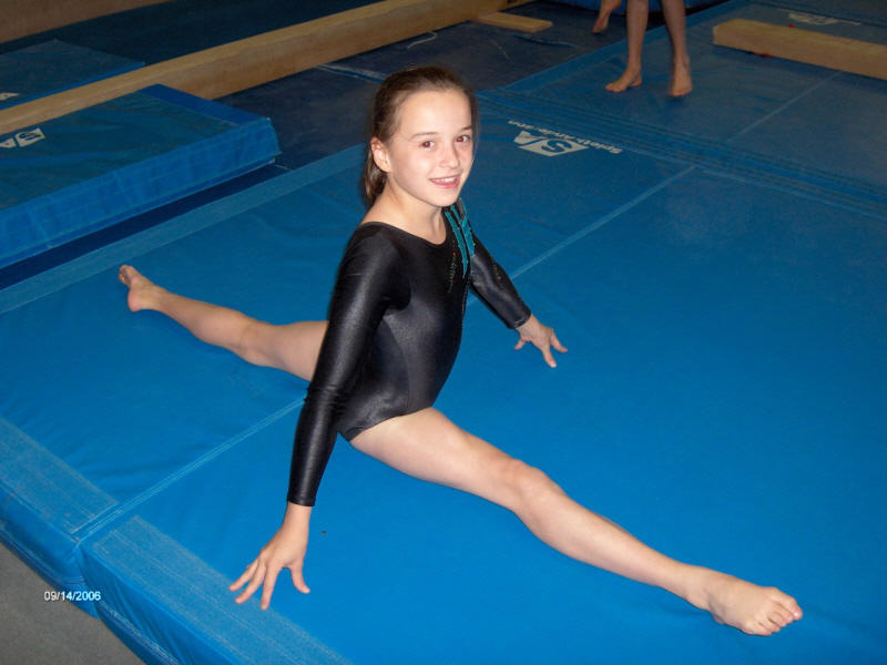 Altadore gymnast